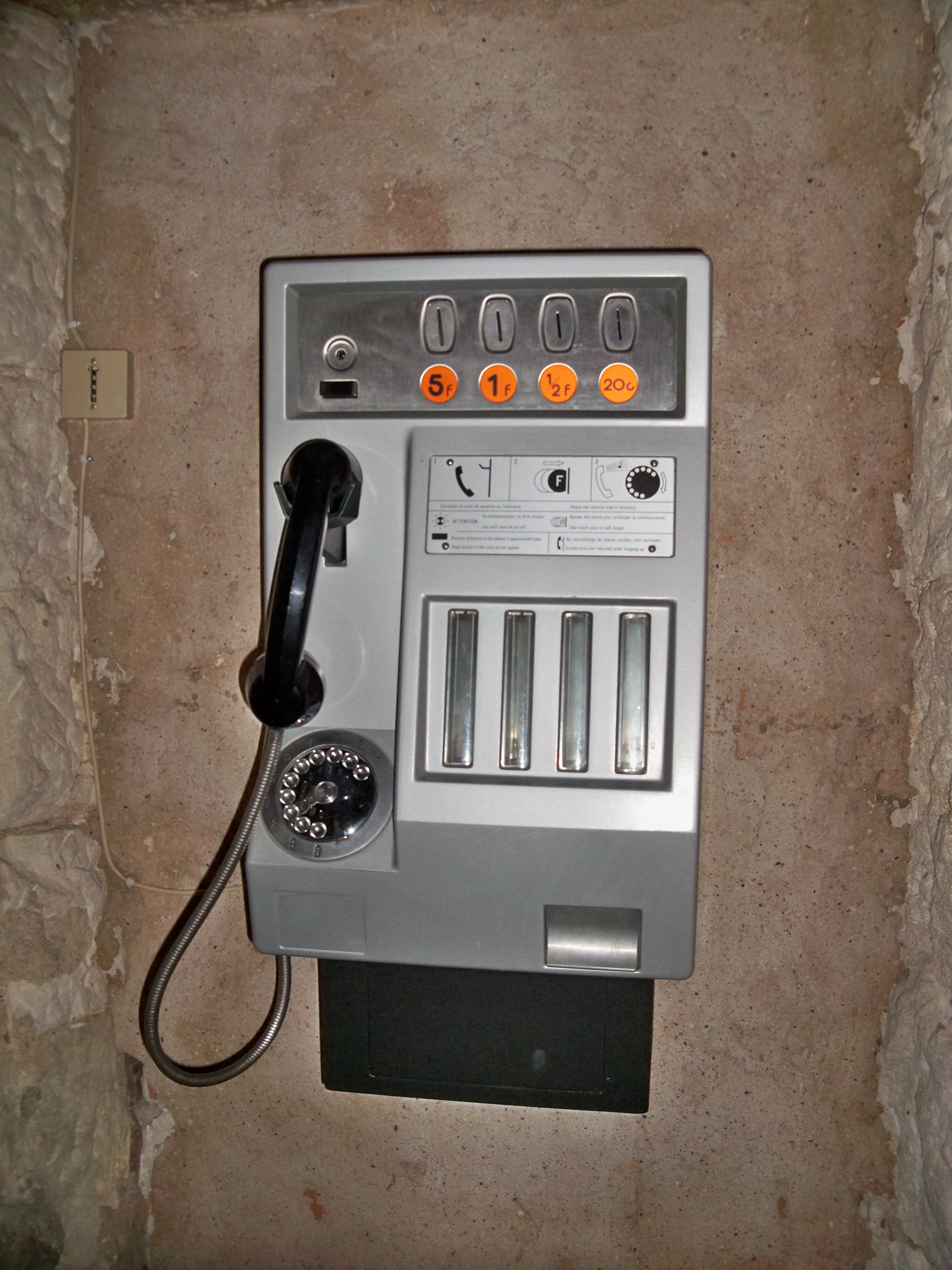 Téléphone publique à pièces (en Francs français)